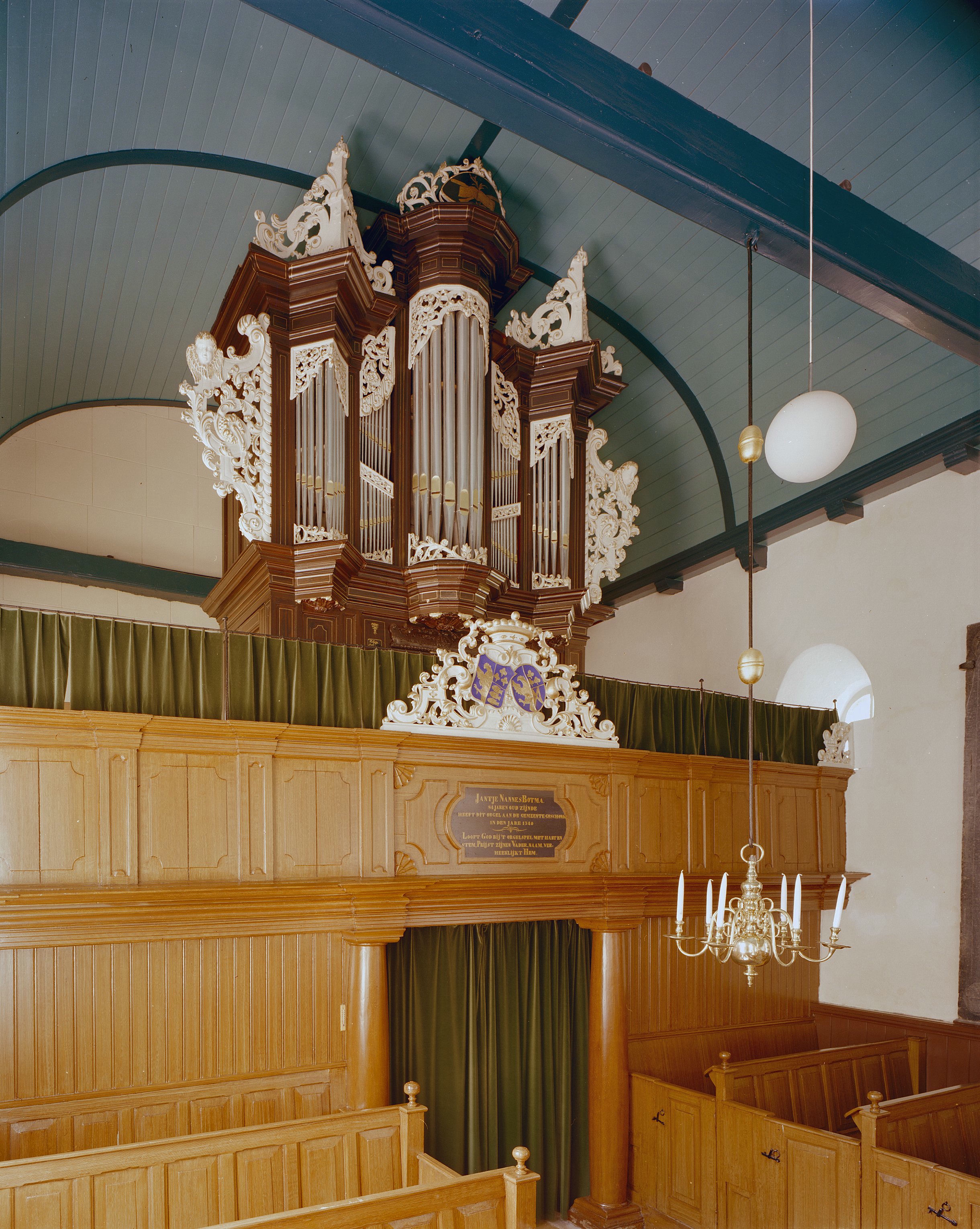 Nederlands Hervormde Kerk: Interieur, aanzicht orgel, orgelnummer 1006 (opmerking: Gefotografeerd voor Het Historische Orgel in Nederland 1726-1769, bladzijder 129)